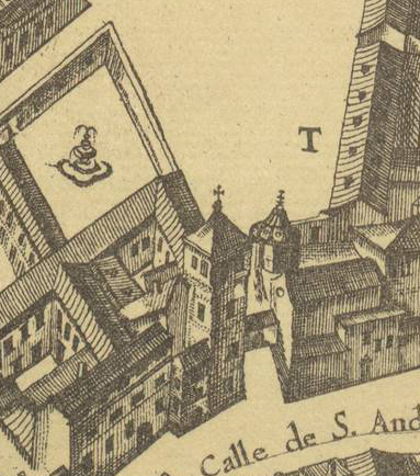 Casa de los Lassos de Castilla, plaza de la Paja e iglesia de San Andrés en un fragmento del Plano de Madrid de Pedro Teixeira (1656).